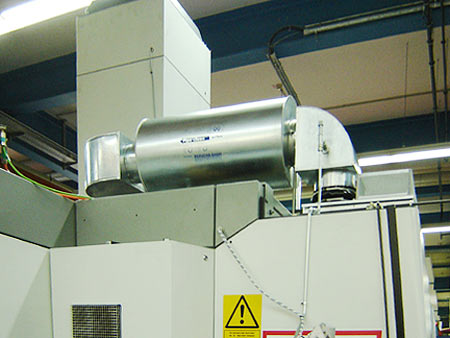 Ölnebelabscheider Typ LCF und Vorabscheider Aerosol Stop zur Verwendung an Werkzeugmaschinen, Hersteller: Firma UT99 AG